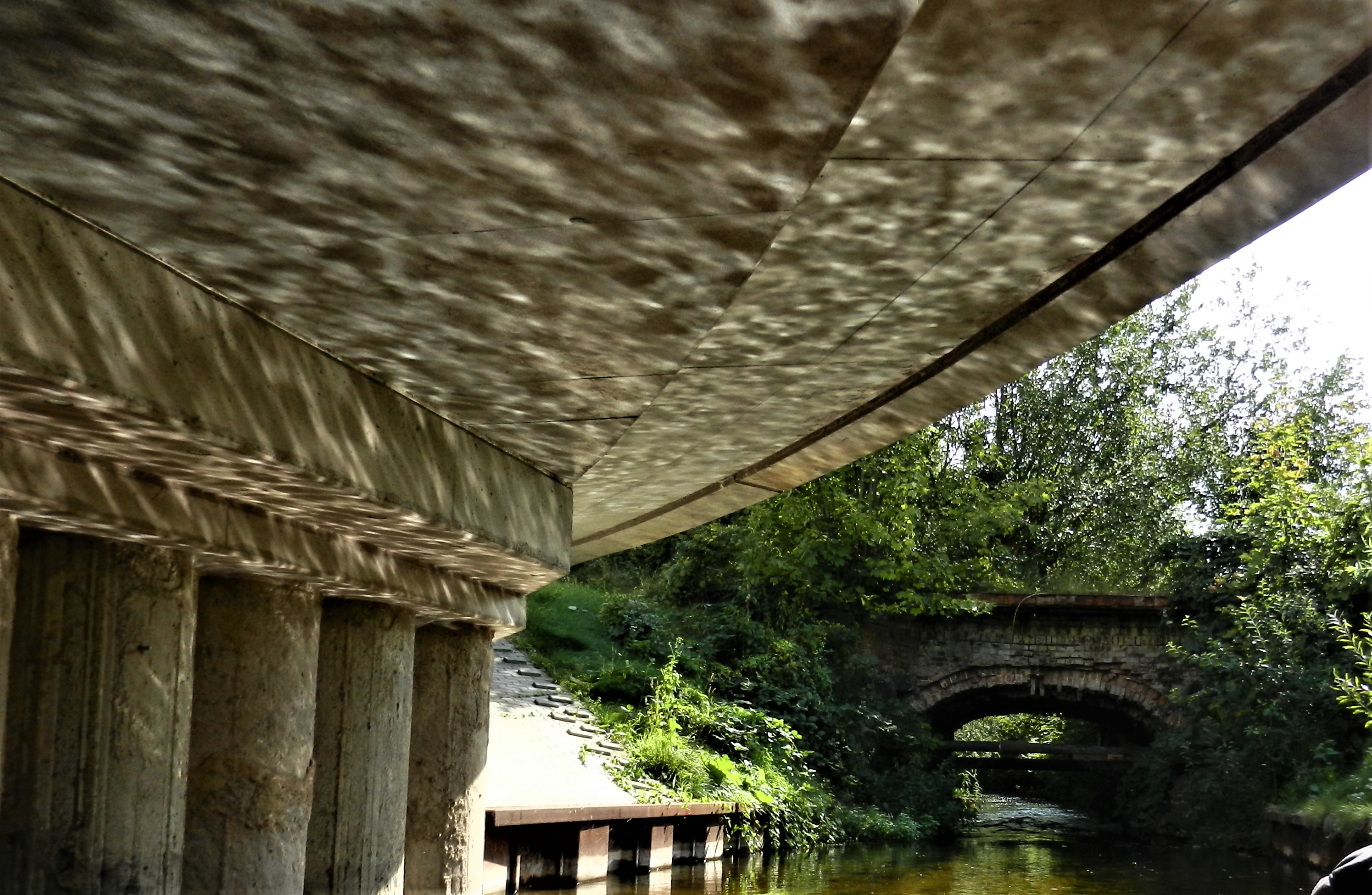 Aubach unter der Obotritenringbrücke Schwerin mit Blick auf die histor. Bischofsmühlenbrücke